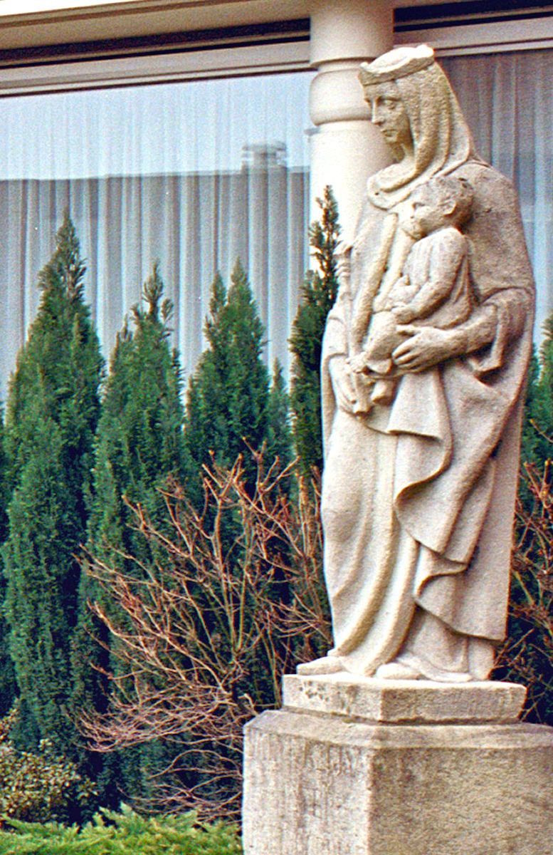 Kloosterkapel Van De Fraters Van Tilburg: Middengedeelte hoofdgebouw met overkapte ingangspartij